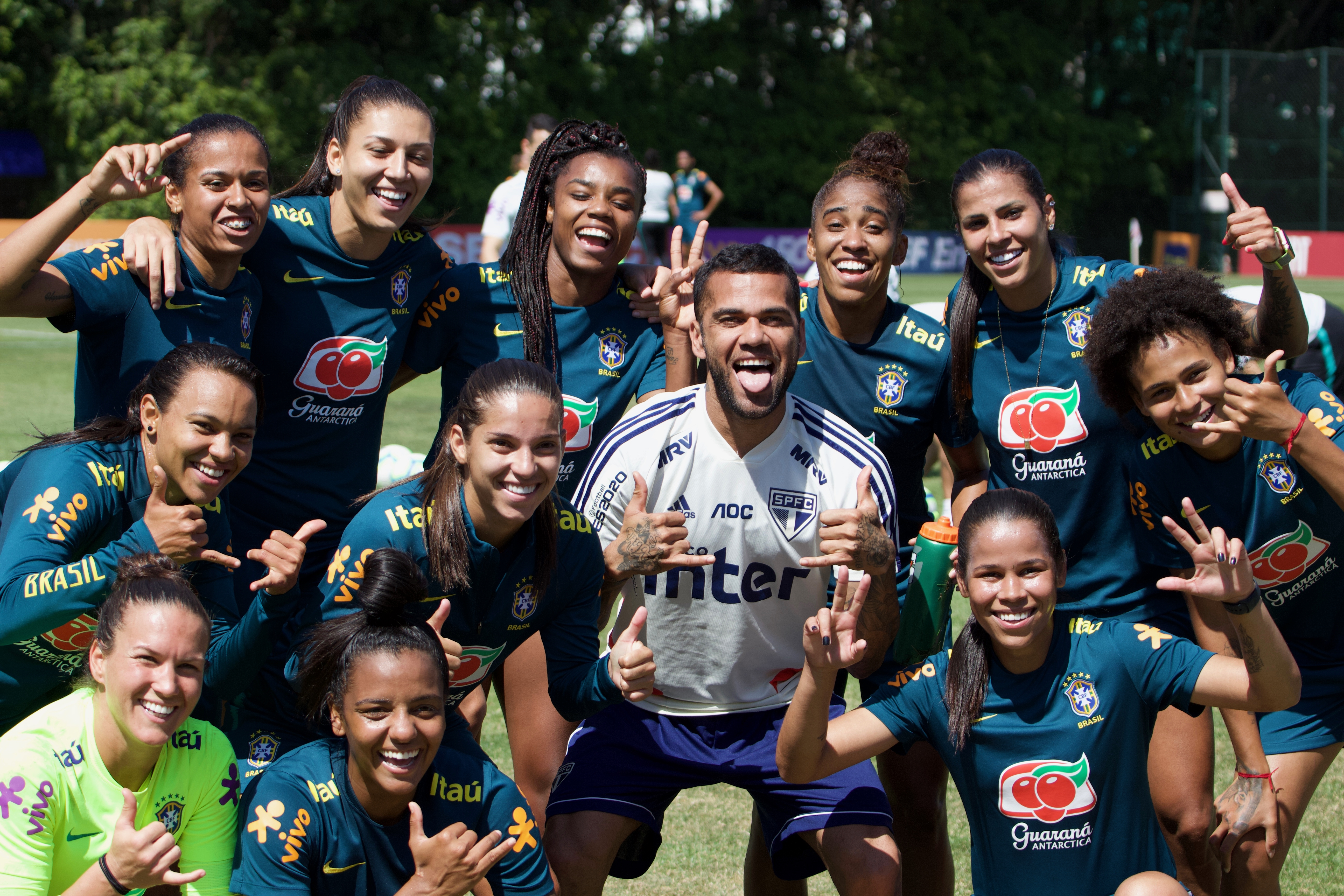 Dani Alves rencontre la selection feminine du Bresil, terrain d entrainement de SPFC